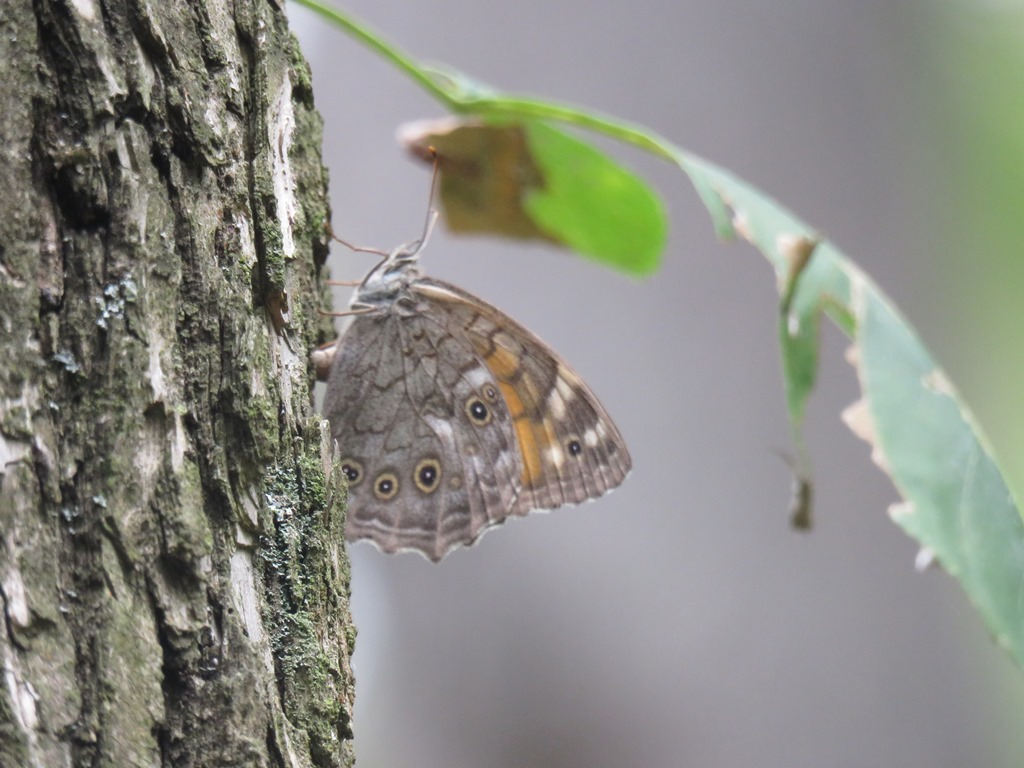 Srpski (latinica): Insekti parkova u Nišu